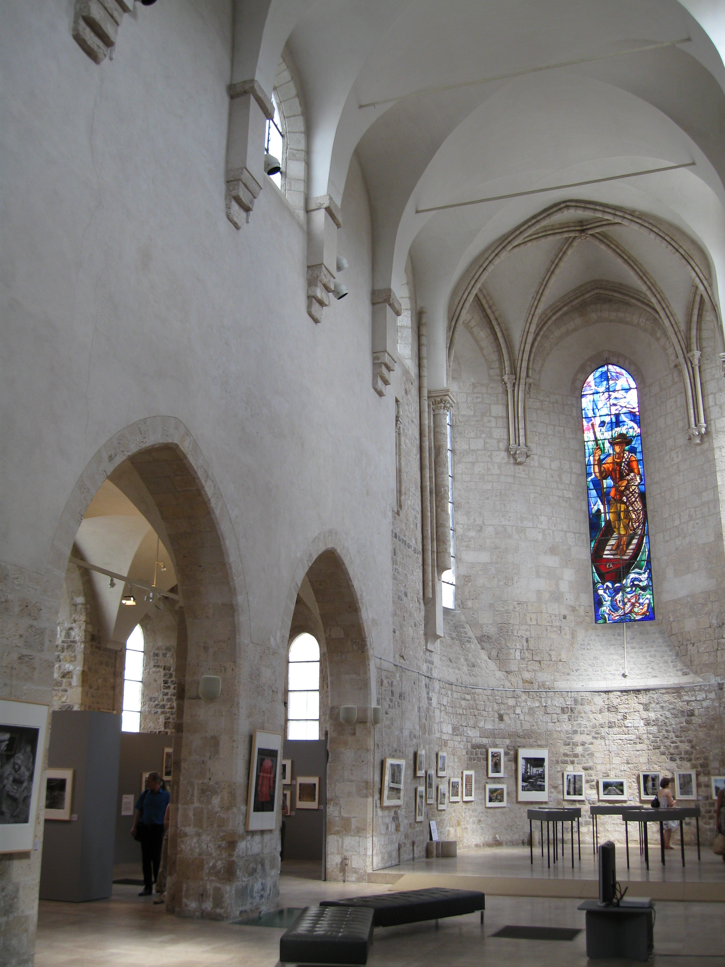 Intérieur de la collégiale Saint-Pierre-Le-Puellier, Orléans, Loiret, France Construite au XIIème siècle, elle a été désacralisée en 1958, et abrite depuis 1976 des expositions culturelles ([1])